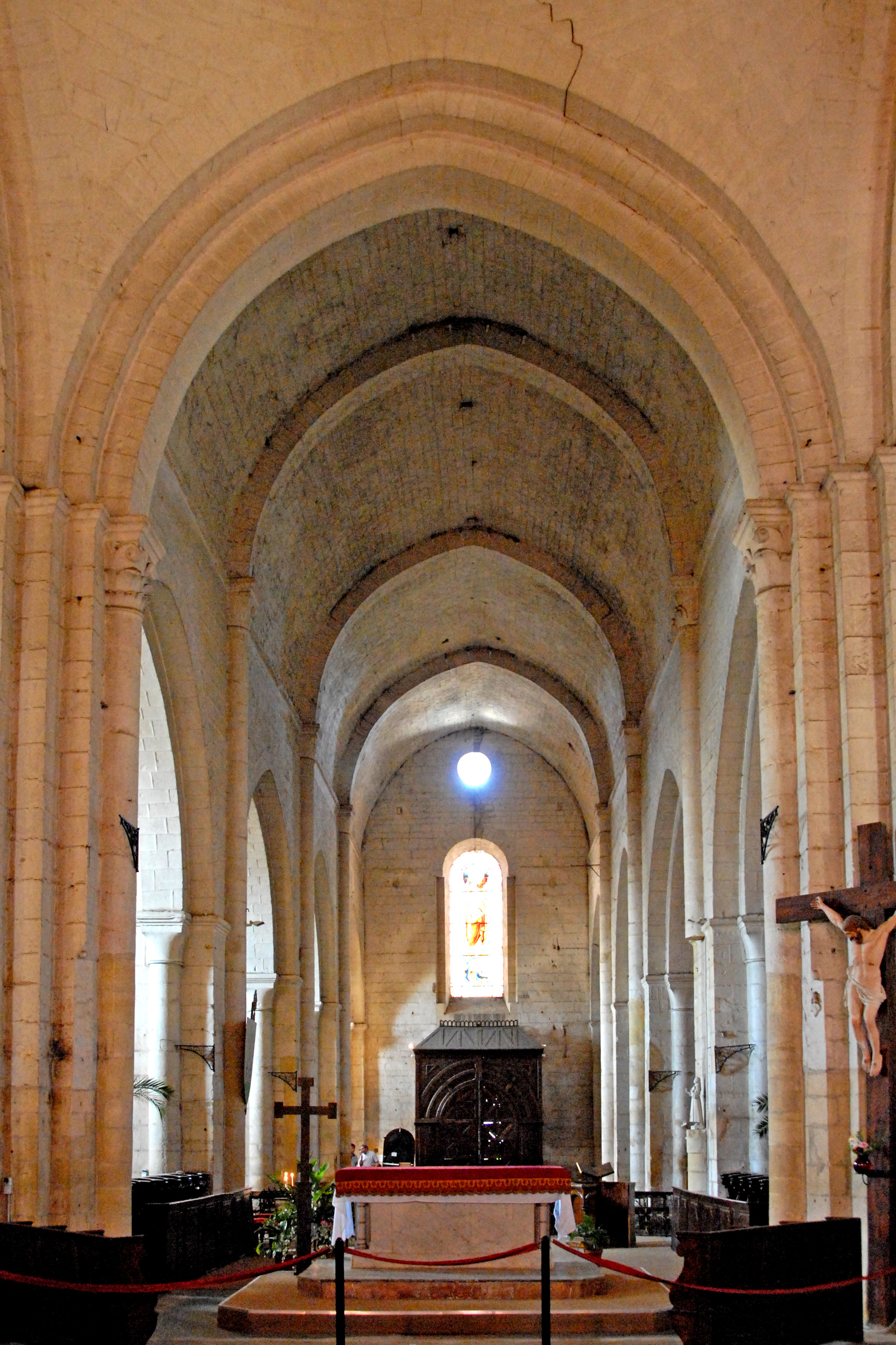 Cadouin, Mittelschiff, zum Portal